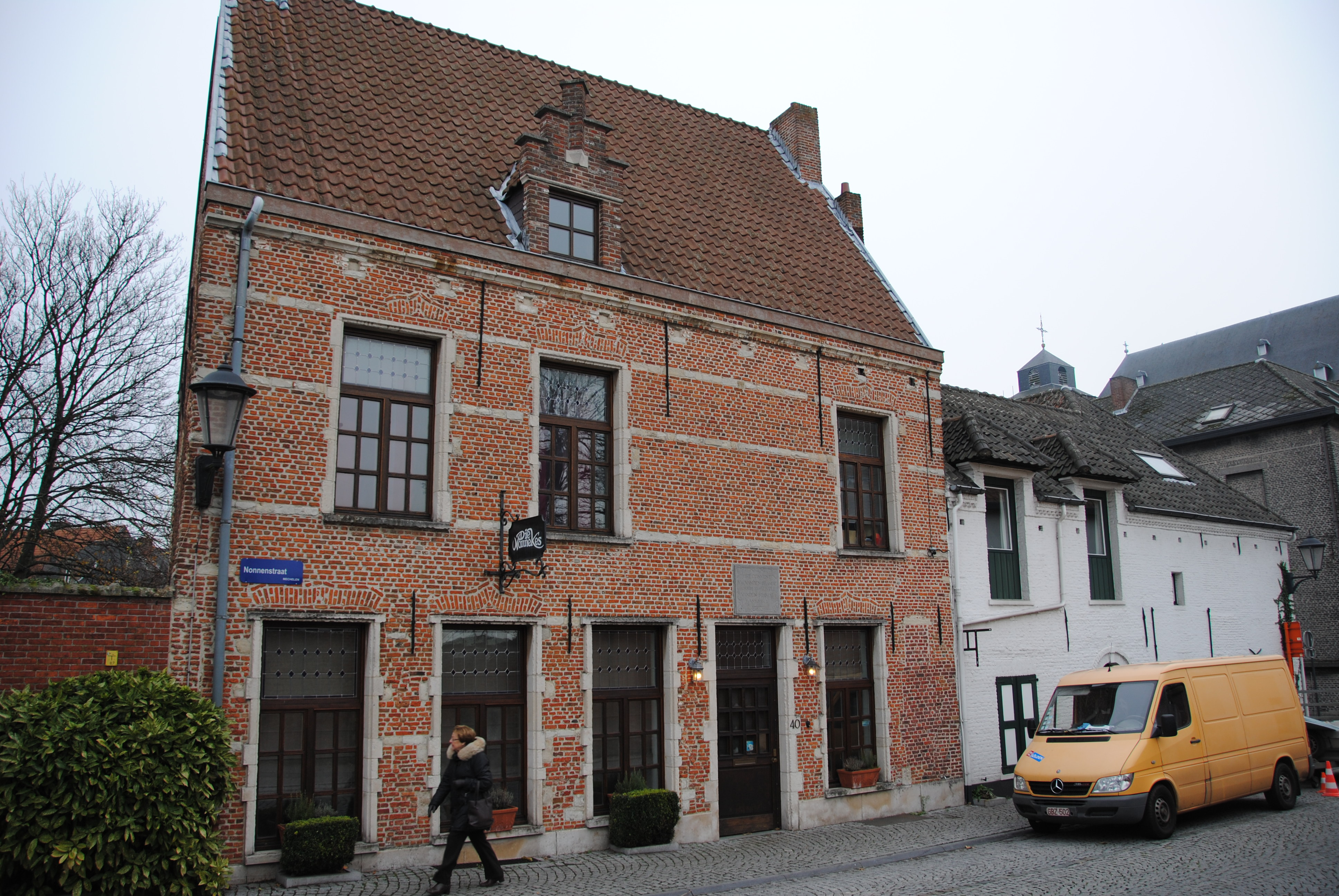 Convent Van Den Brande, Nonnenstraat 40, Mechelen